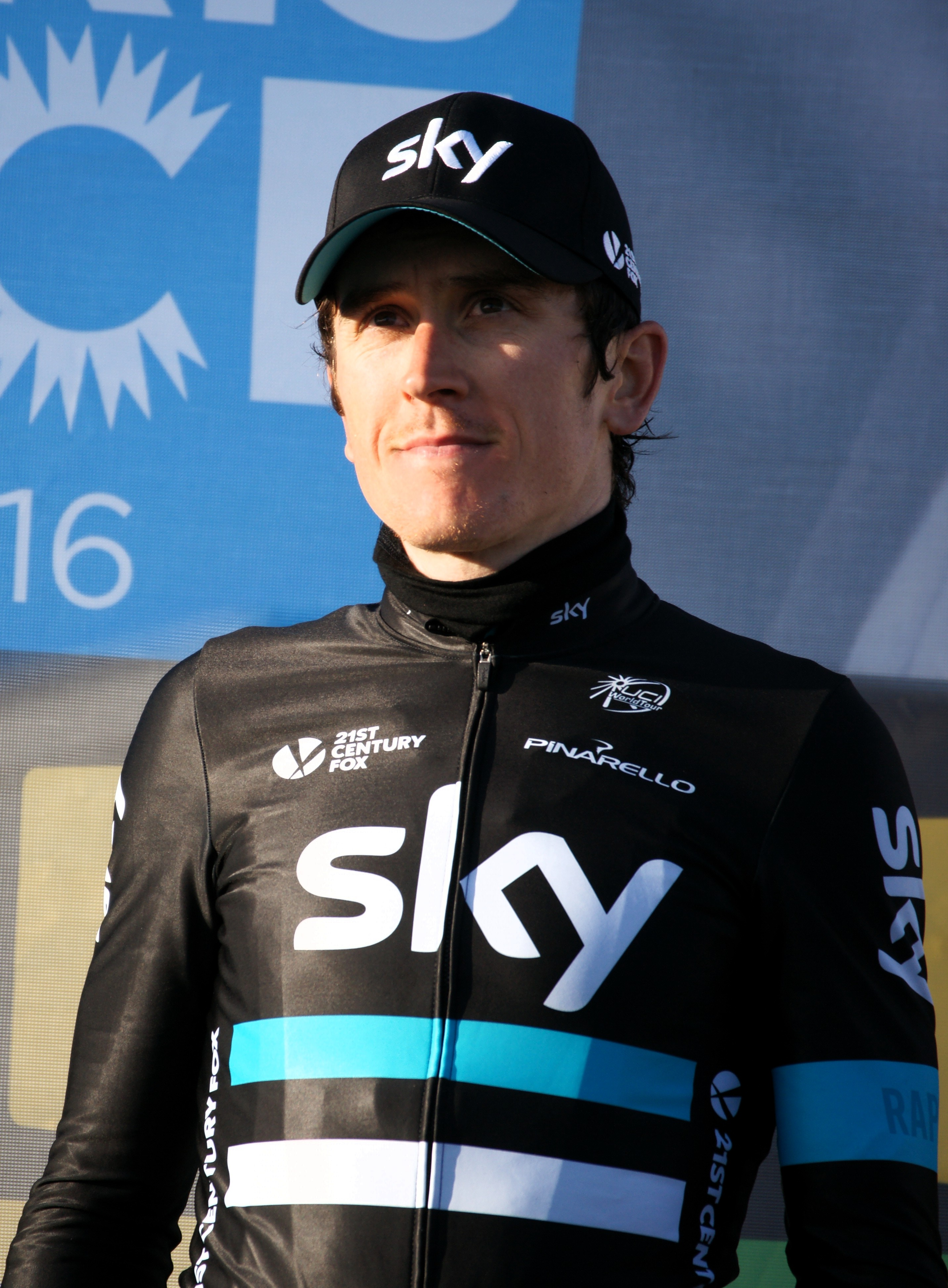 Geraint Thomas Madone d'Utelle 2016 Depicted person: Geraint Thomas Depicted team: Sky